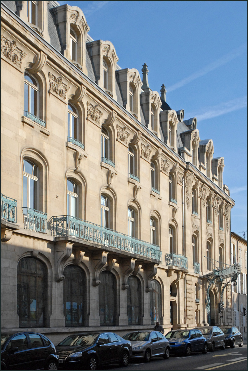 La Chambre de Commerce et d’Industrie de Meurthe-et-Moselle a été inaugurée en juin 1909. Elle est installée dans un bâtiment Art Nouveau auquel ont contribué les plus grands créateurs de l’École de Nancy : les architectes Louis Marchal et Émile Toussaint pour le bâtiment ; Antonin Daum et Jacques Gruber pour les vitraux; Louis Majorelle pour les ferronneries.